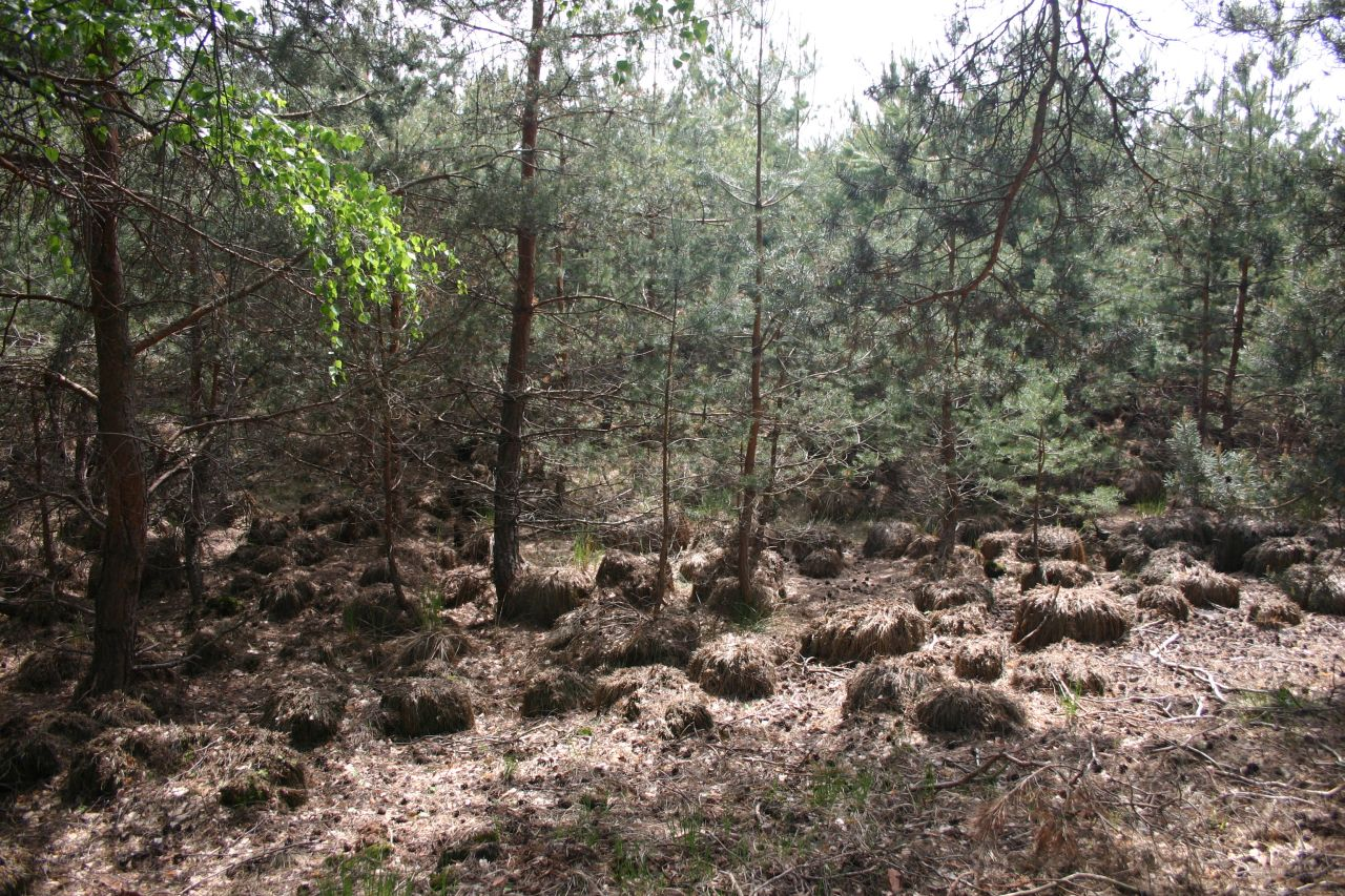 Moor am Luchsee, Kiefern haben seit 1990 weitgehend die alte Moorvegetation (Seggen) verdrängt.